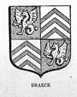 Wapenschild Vlaamse Adel